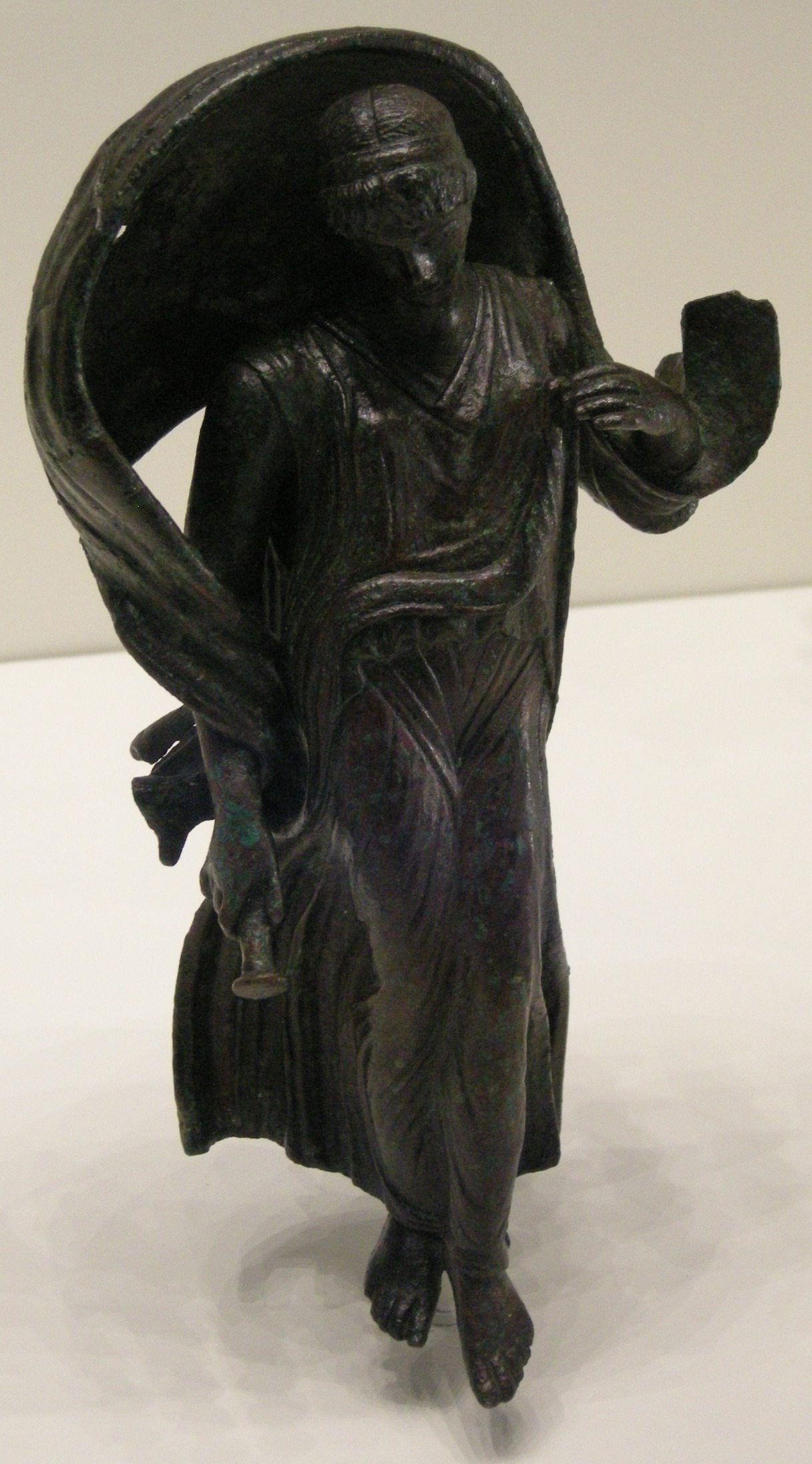 Arte romana, statuetta di nyx o selene, I secolo ac